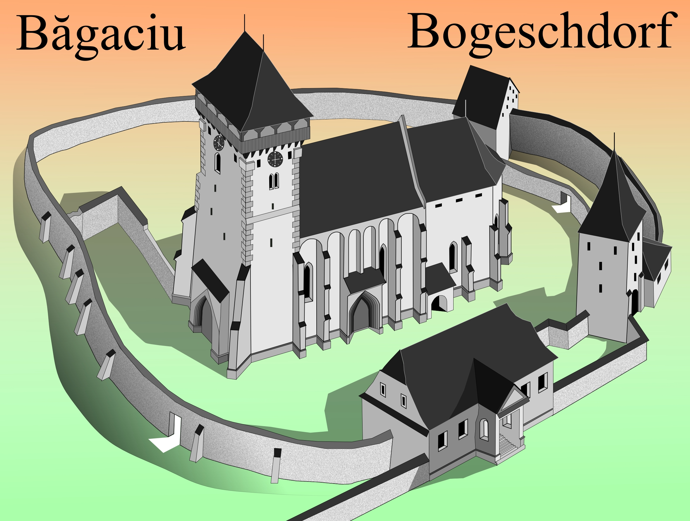 Biserica fortificata din Bagaciu